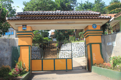 gerbang utama sman 1 padalarang